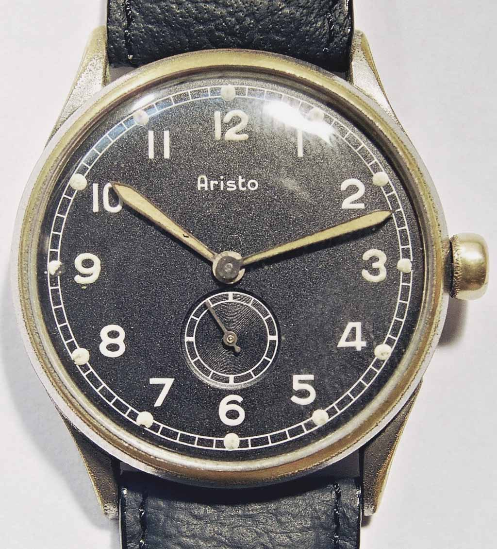 Damalige Reichluftfahrtsministerium Uhr